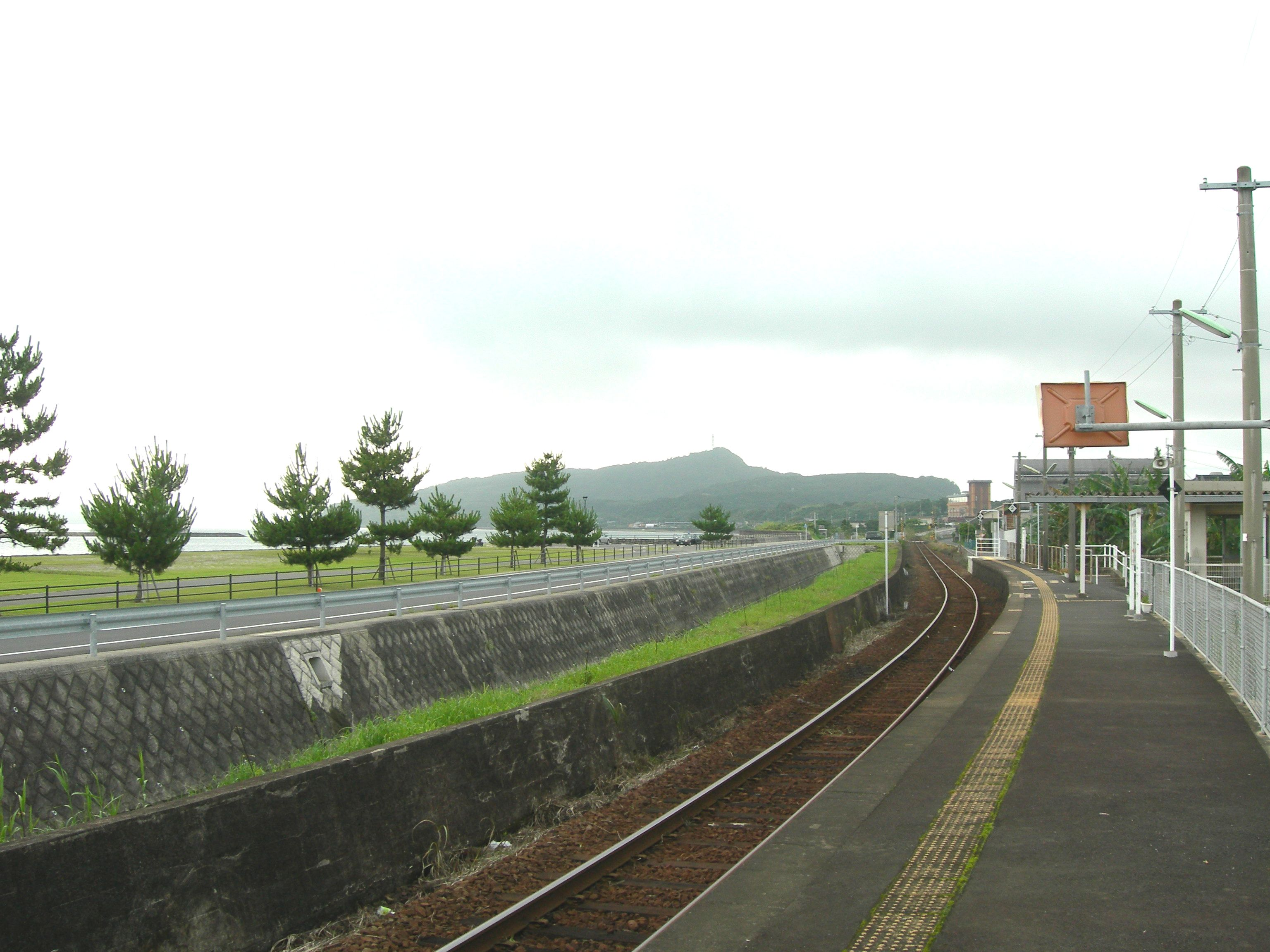 宮ヶ浜駅（みやがはまえき）ホーム